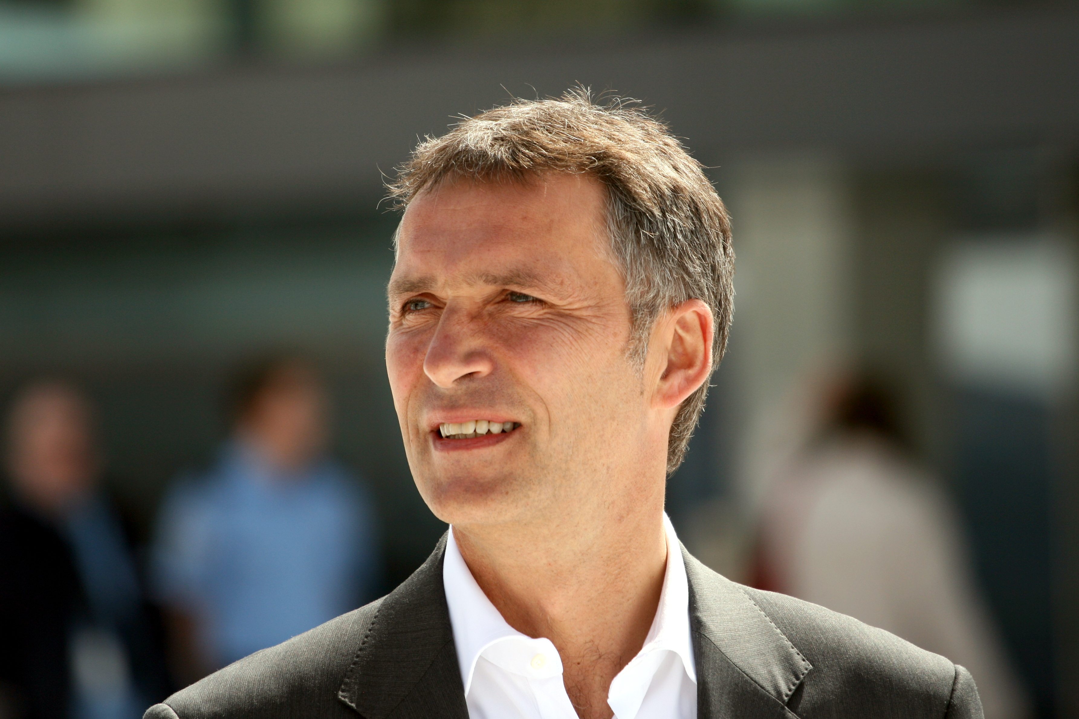 Statsminister Jens Stoltenberg under Bill og Melinda Gates' besøk i Operaen 2009.